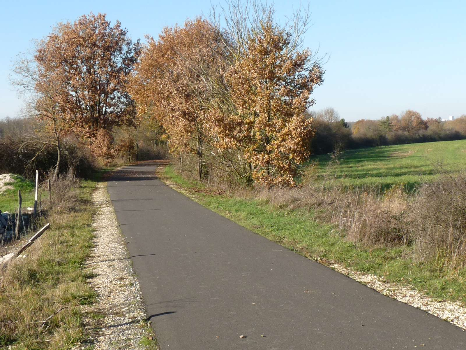 ancienne voie ferrée Angoulême-Nontron, Pranzac, Charente, France; piste cyclable Pranzac-Feuillade